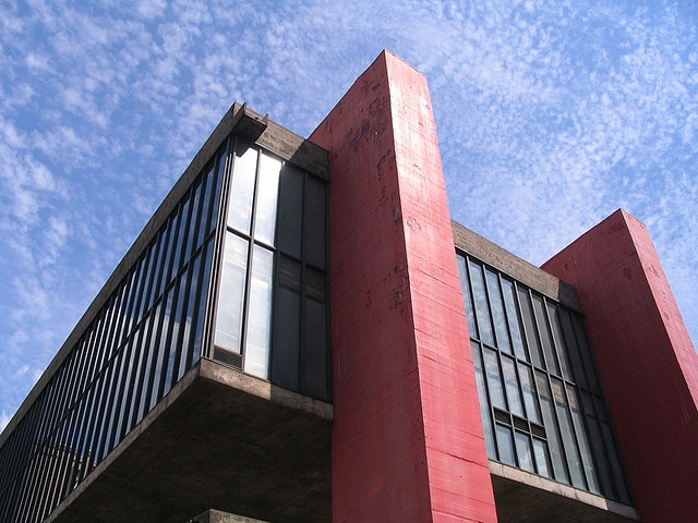 O Masp vale a visita só pelo prédio